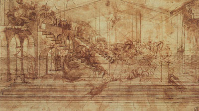 pl: Studium perspektywiczne do Pokłonu Trzech Króli en: Study for Adoration of Magi